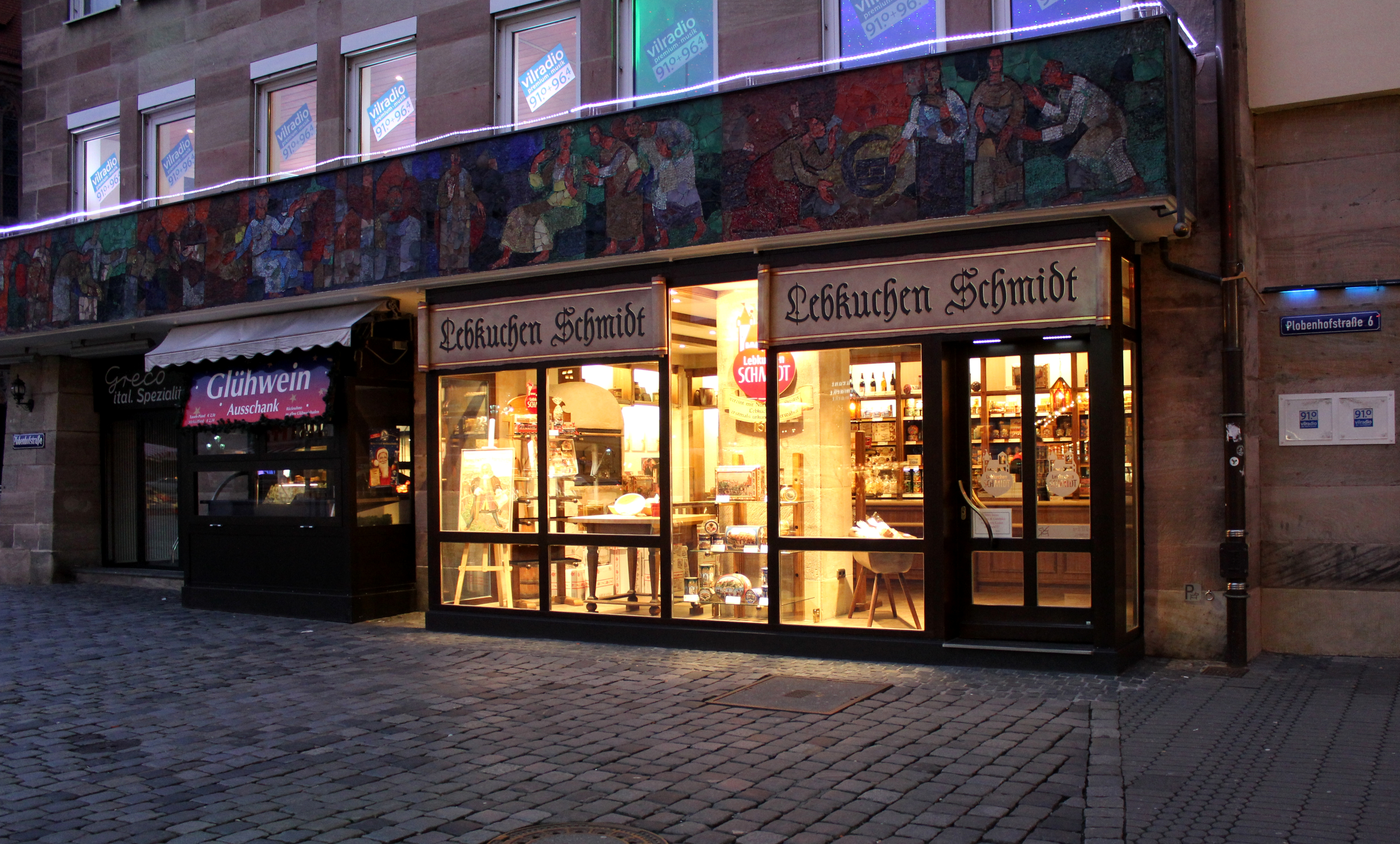 Lebkuchen-Schmidt - Nürnberg - Plobenhofstraße 6 (Am Hauptmarkt)